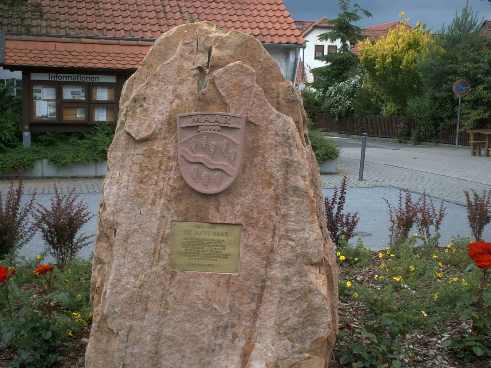 der Gedenkstein, 750 Jahre Maar mit dem Määrer Wappen